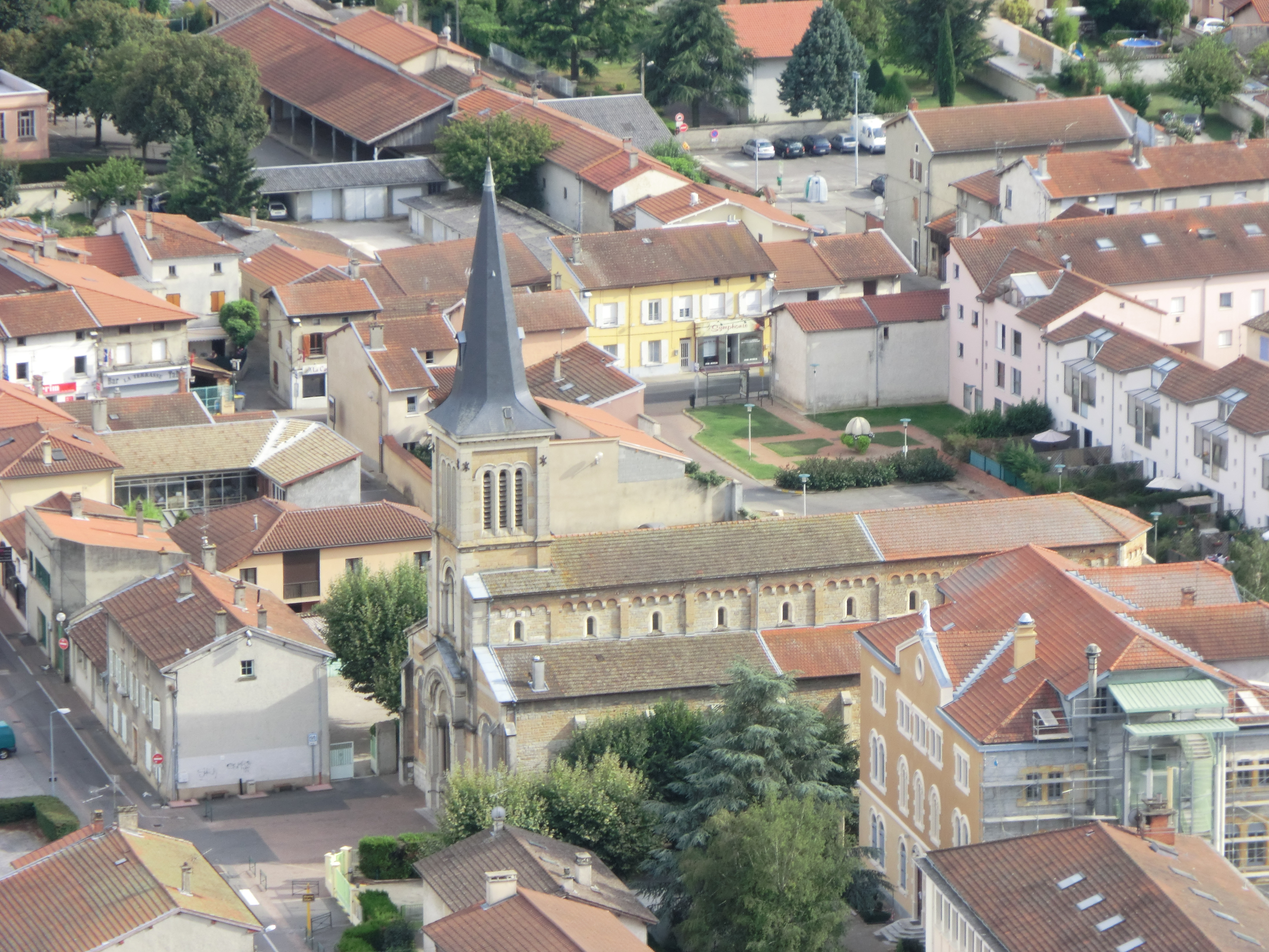 Église Saint Romain de Miribel depuis le sommet de la Vierge du Mas Rillier. On peut également voir, le petit square Lucien-Agnel.